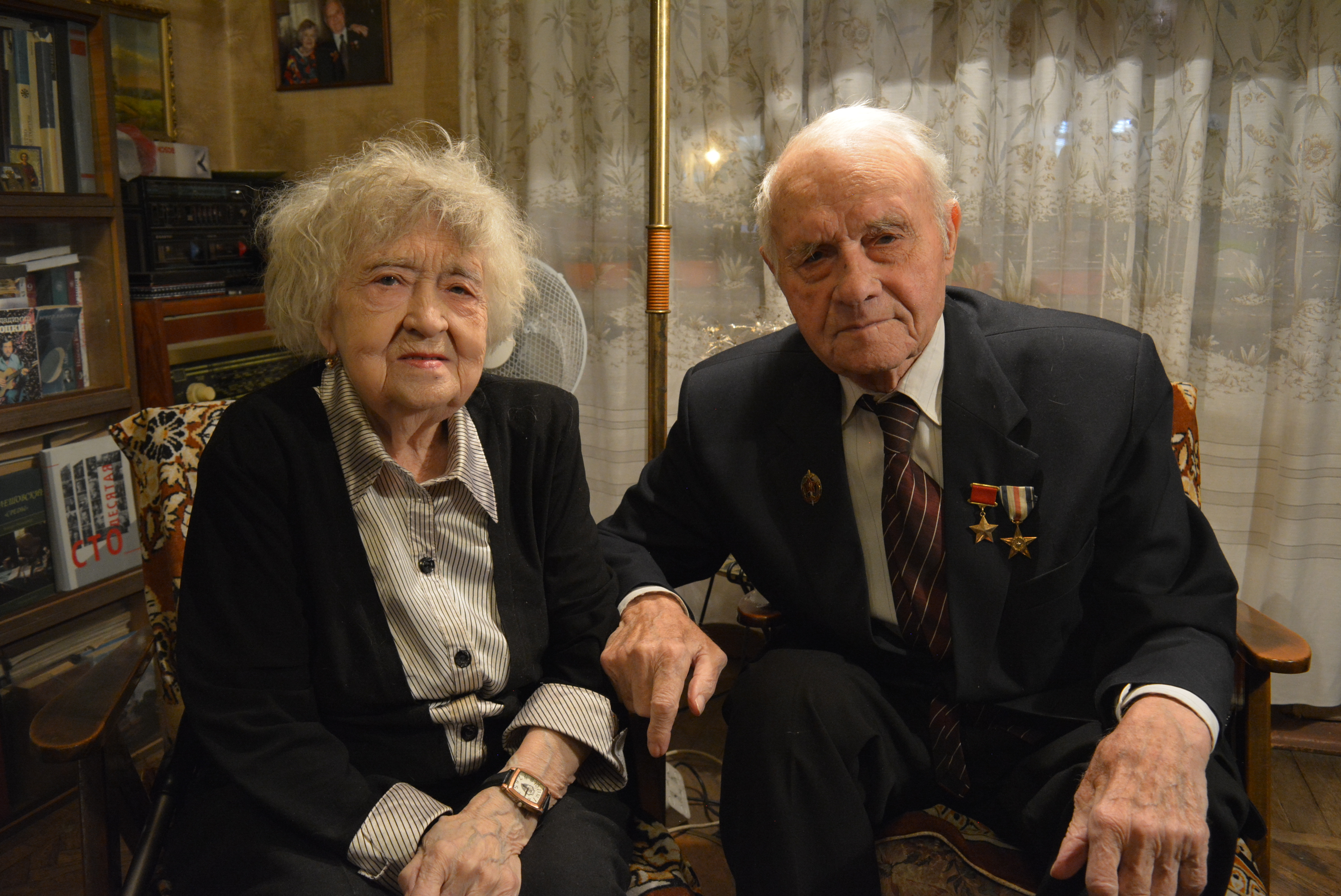 Герой Советского Союза Алексей Прохорович Волошин со своей супругой Нинель Константиновной Волошиной у себя дома. 2016 год.